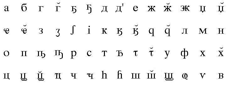 Абхазский алфавит, составленный Чочуа (из учебника 1925 года).